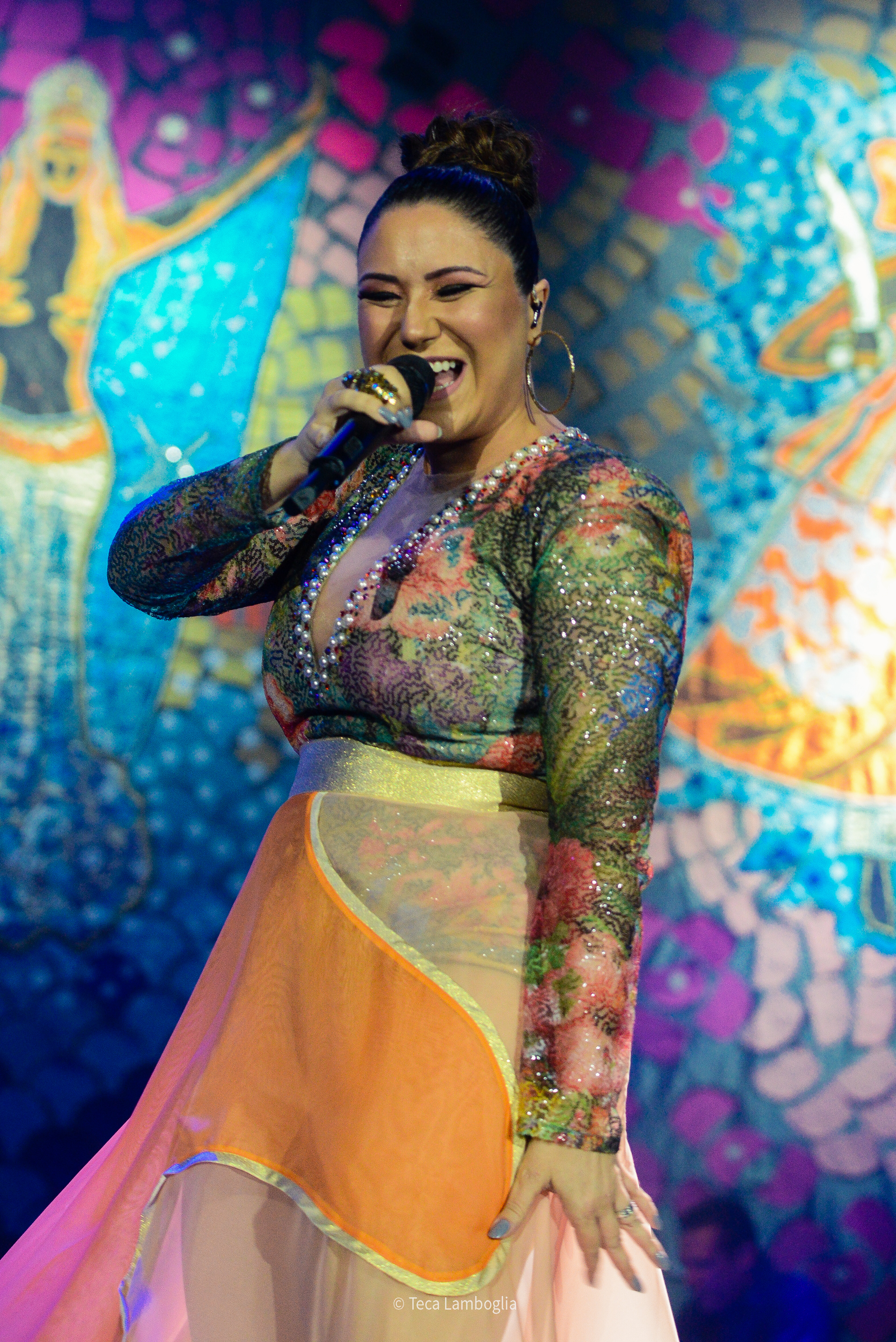 Maria Rita no Tom Brasil, 2018